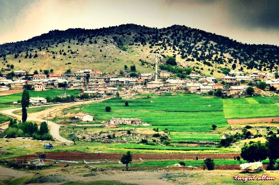 Konya Bozkır Kınık Köyü